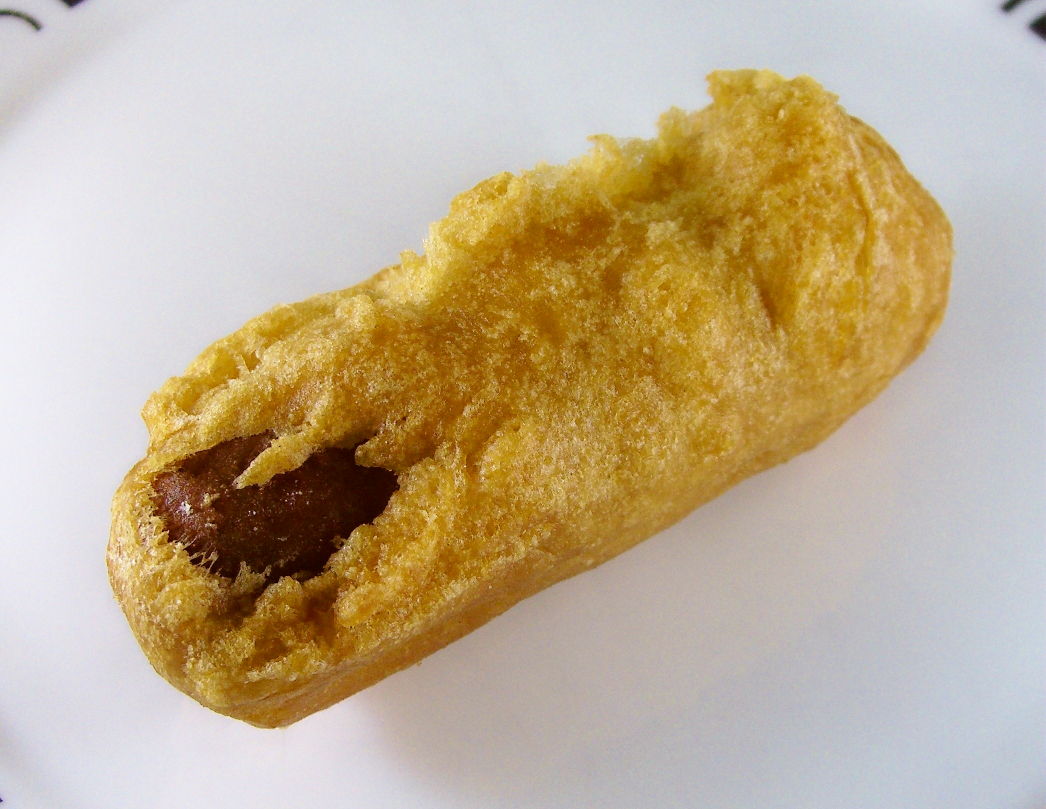 Battered sausage